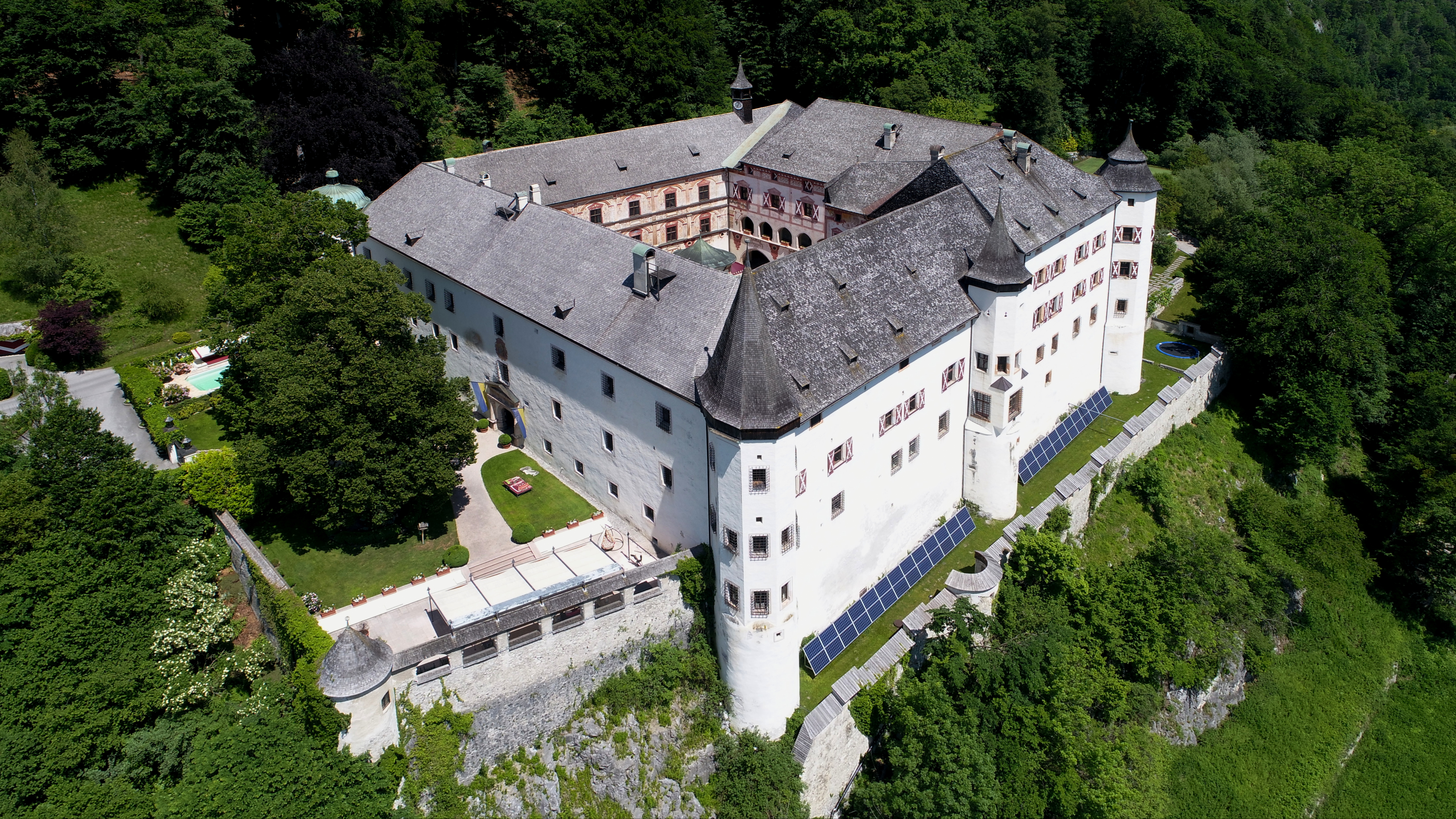 Schloss Tratzberg aus der Vogelperspektive (2017)